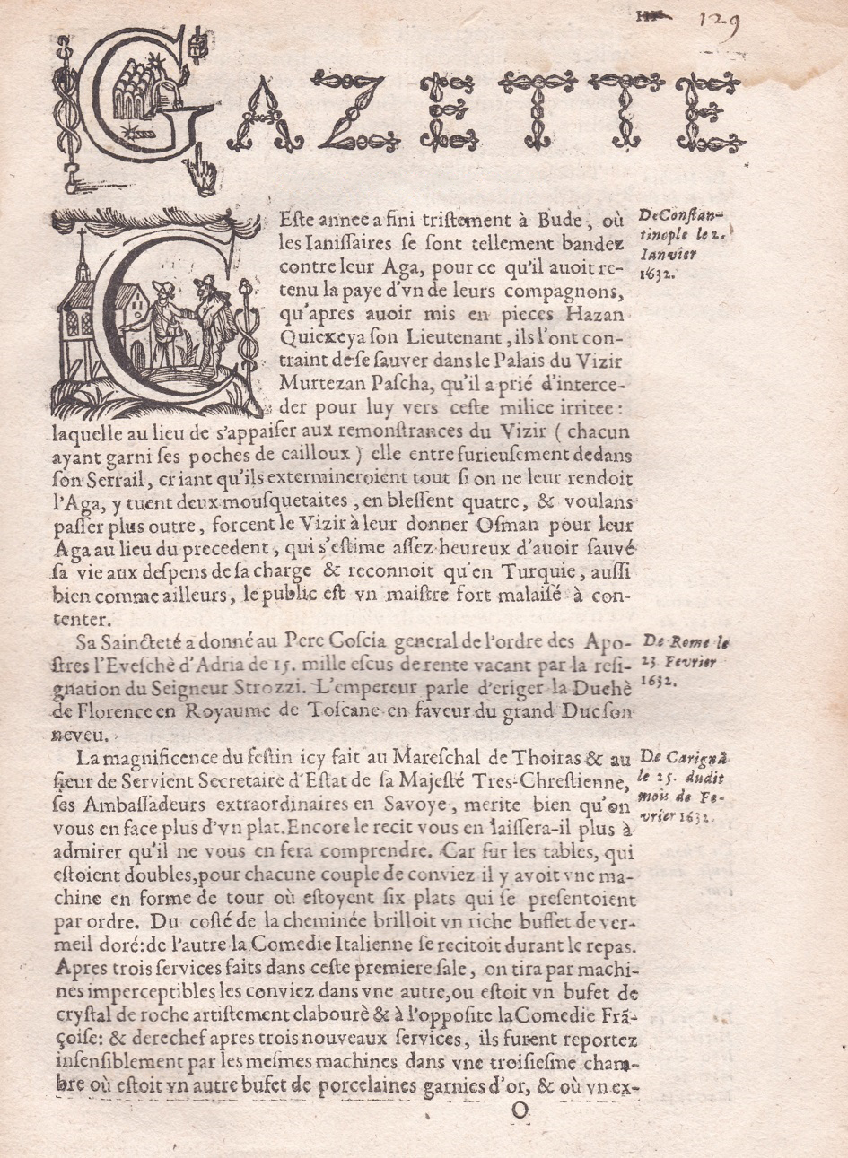 Photographie du premier hebdomadaire français: la Gazette de Renaudot. Ici, un numéro de l'année 1632.